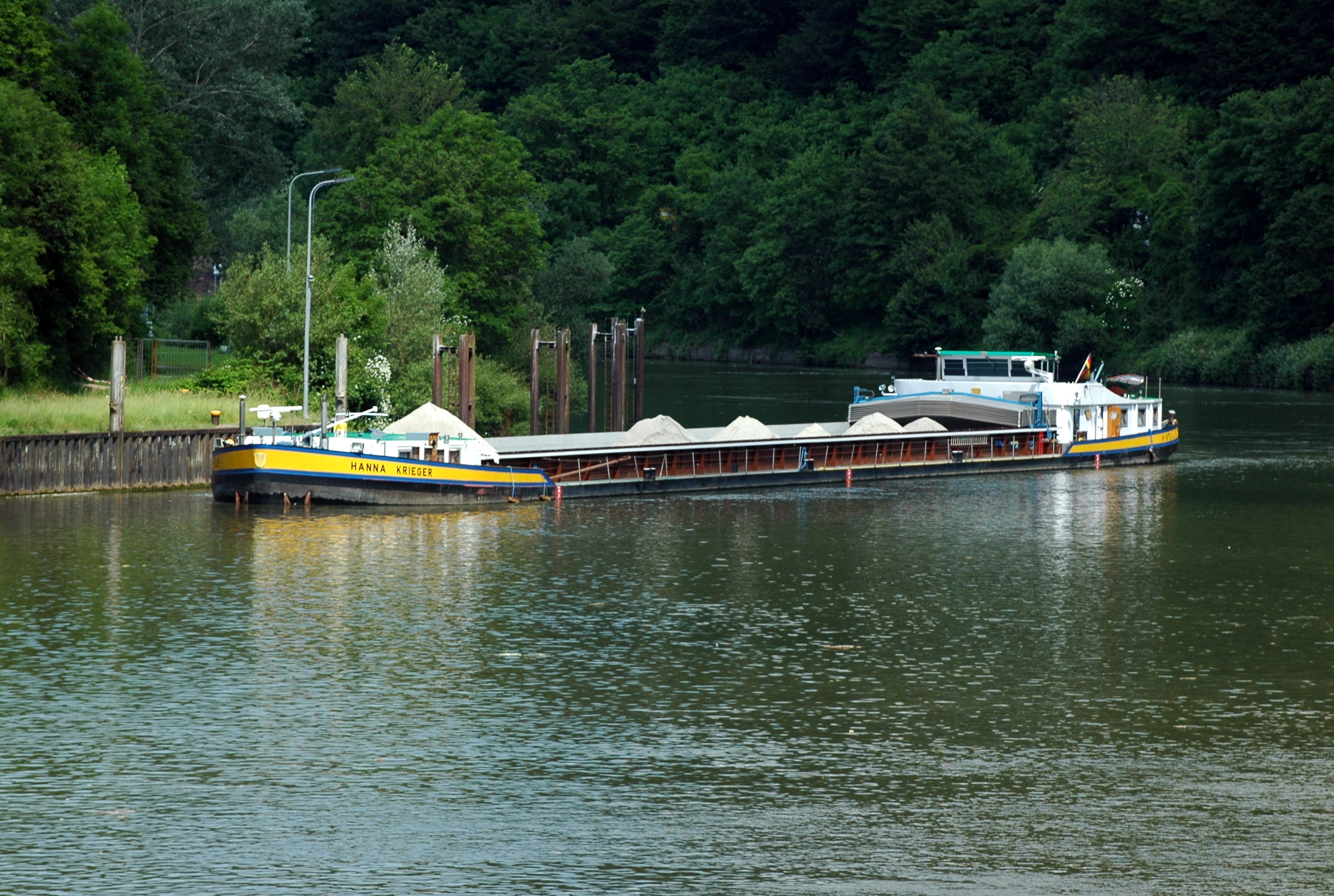 Shiff Hanna Krieger (1989)